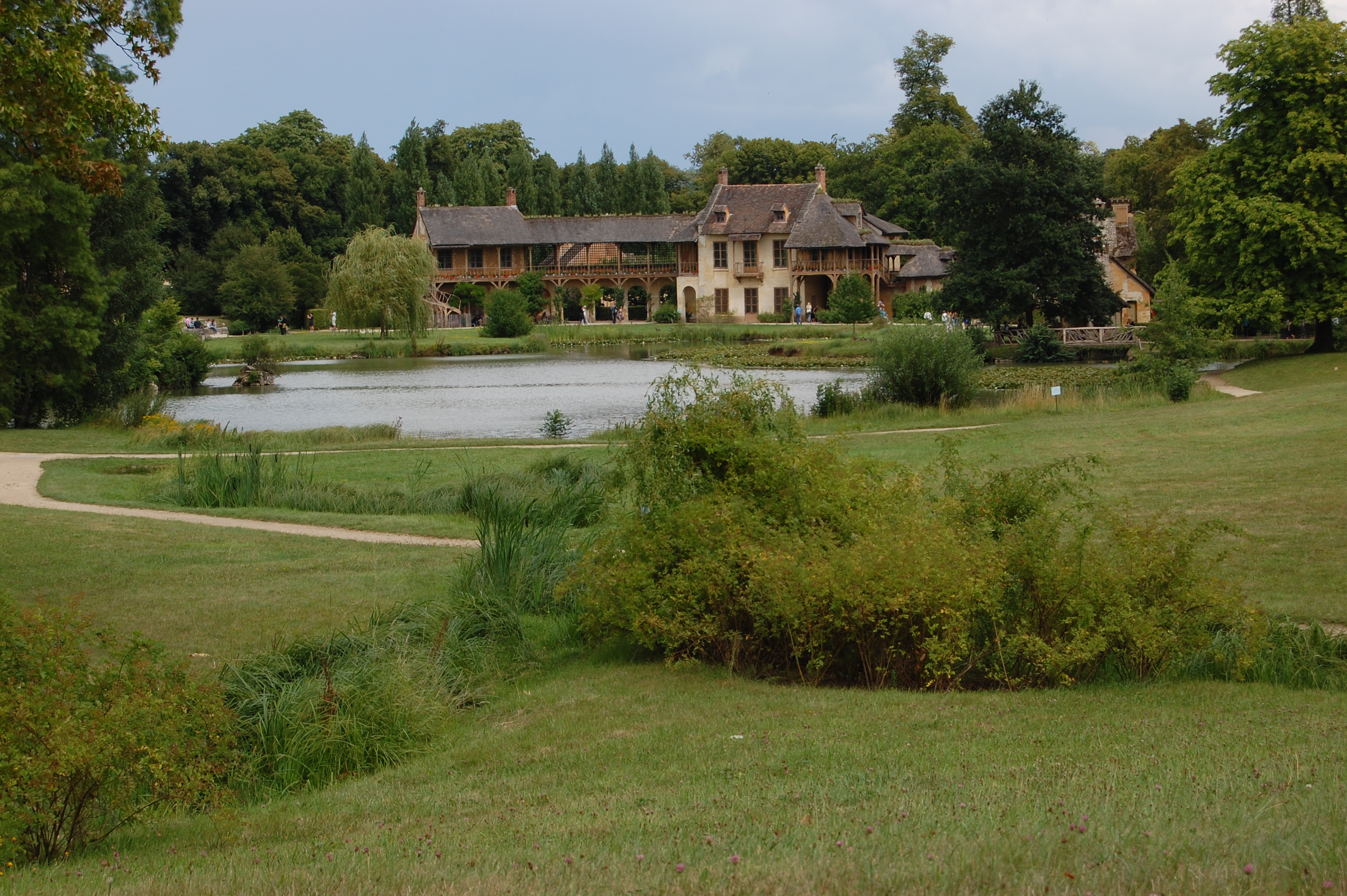 Les cascatelles, l'étang et la maison de la Reine